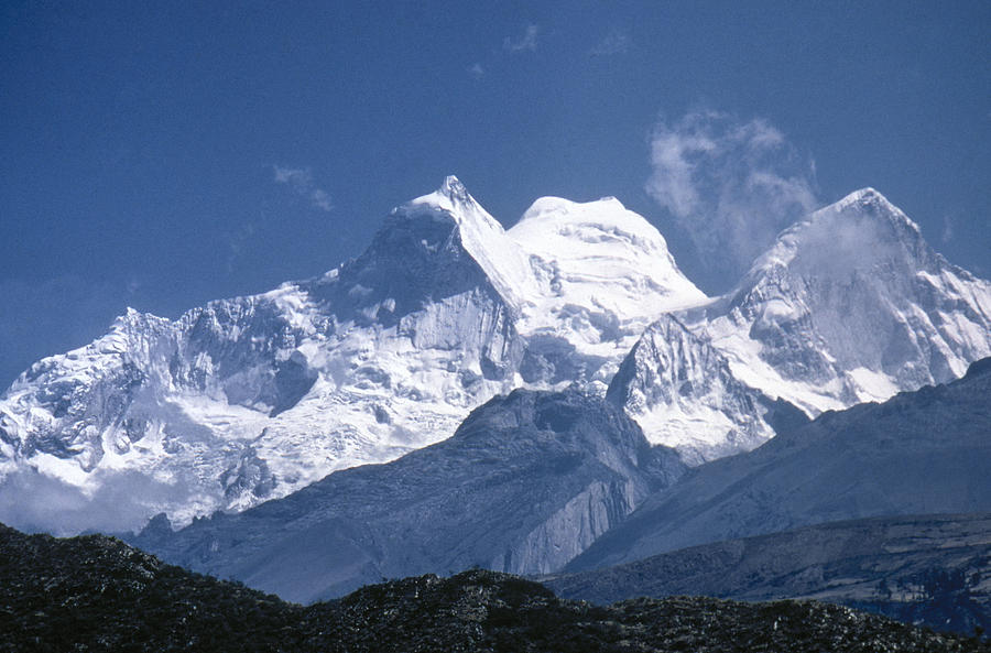 Huandoy